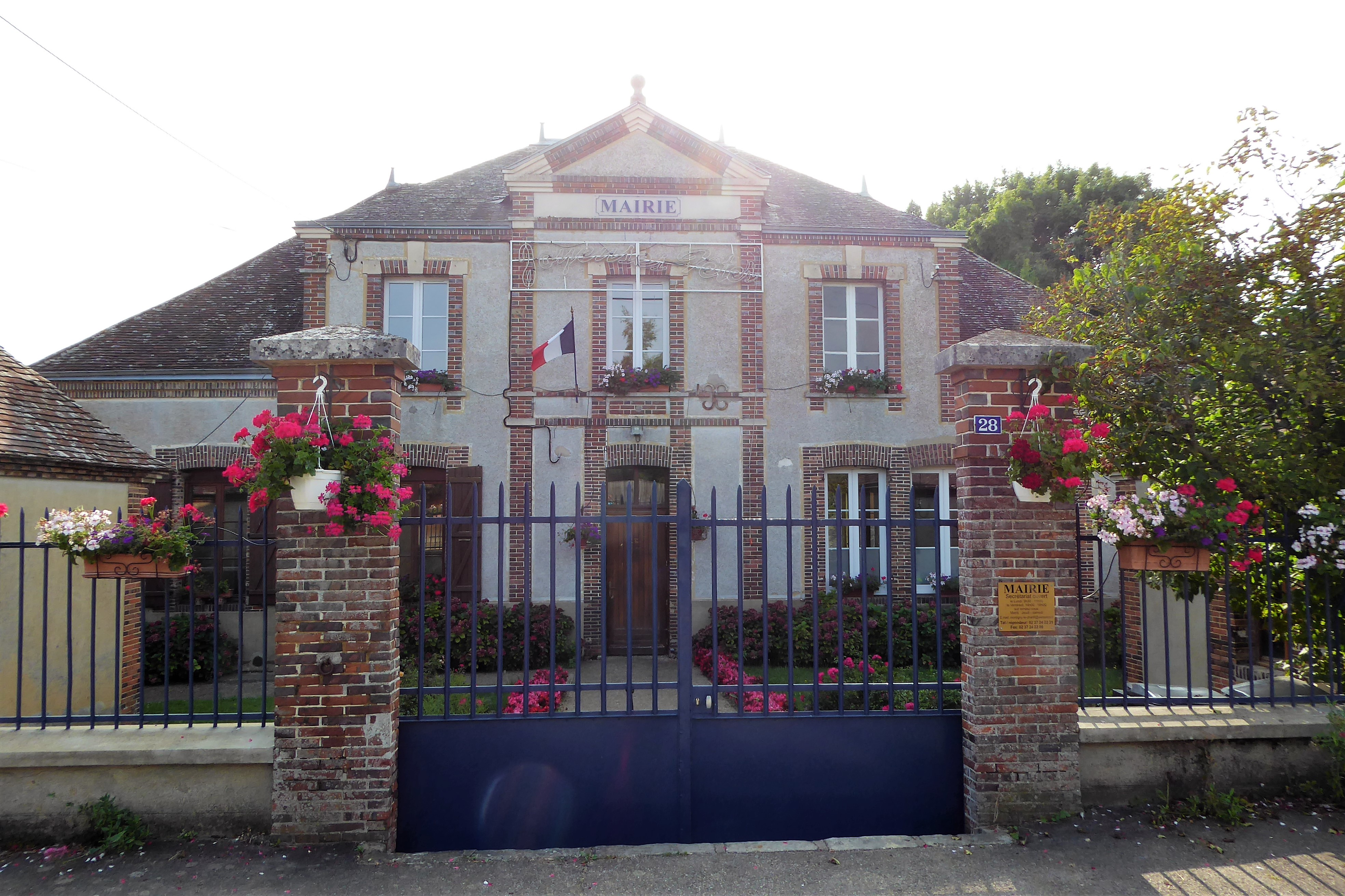 mairie, Montigny-le-Chartif, Eure-et-Loir (France).